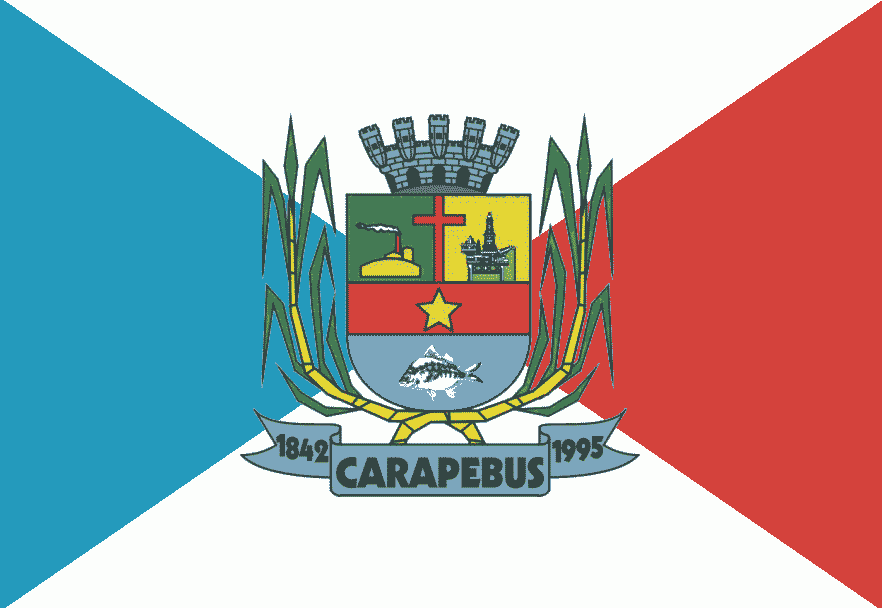 Bandeira do município de Carapebus, no estado do Rio de Janeiro.